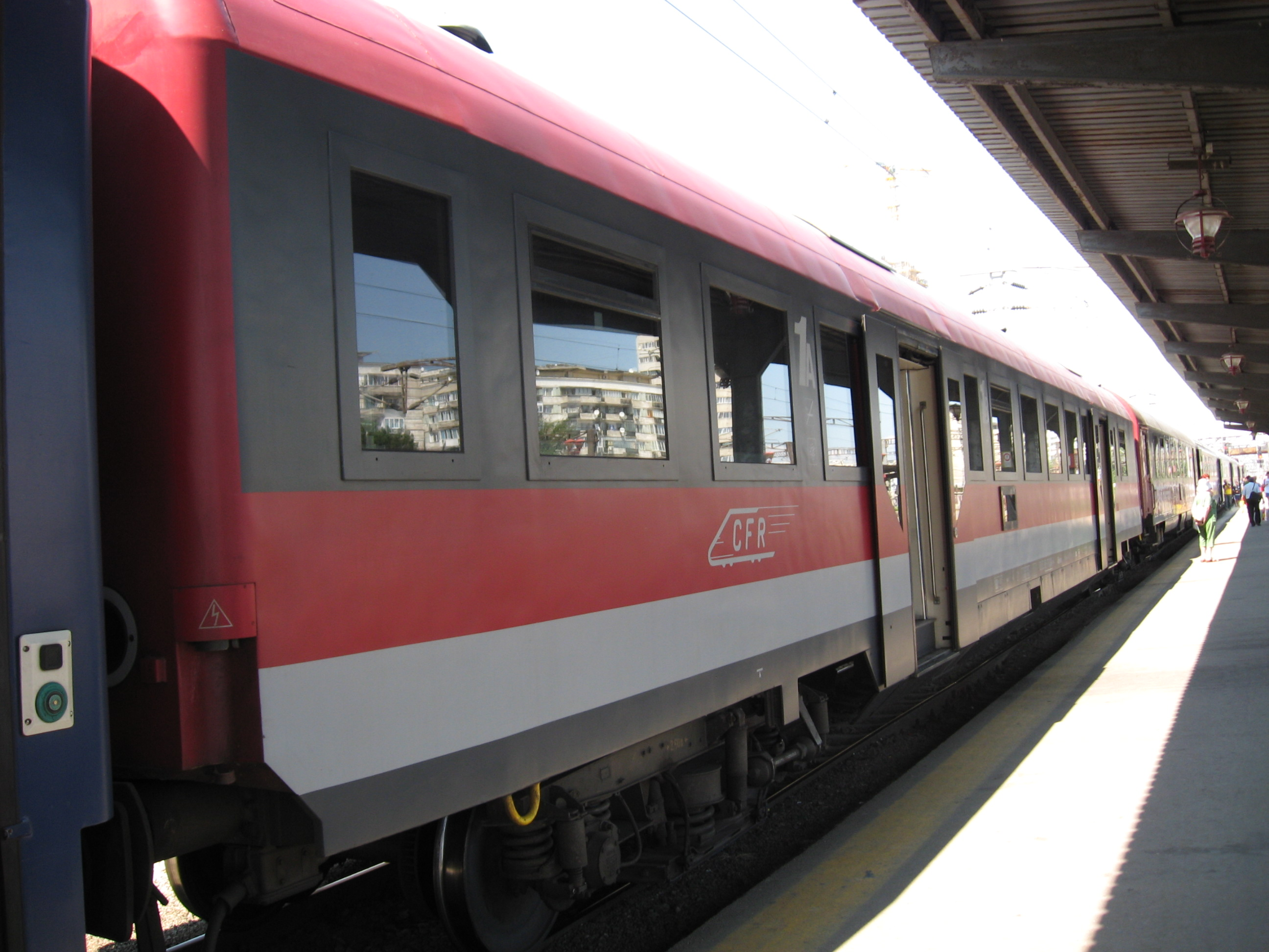 50-53-85-76 004-4 (Business Class) serving IC 531 (Bucureşti-Oradea)